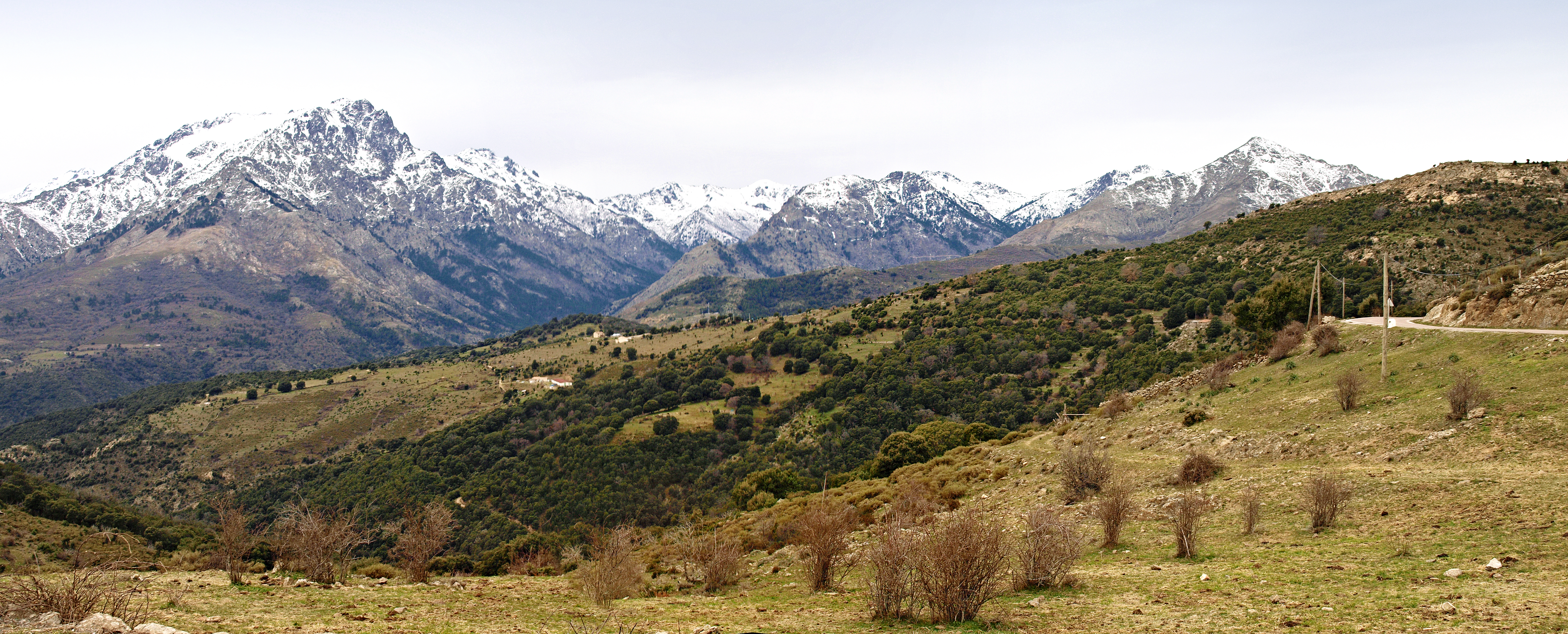 Le Giunssani (Corsica) - Vallée de la Tartagine et ses hauts sommets.